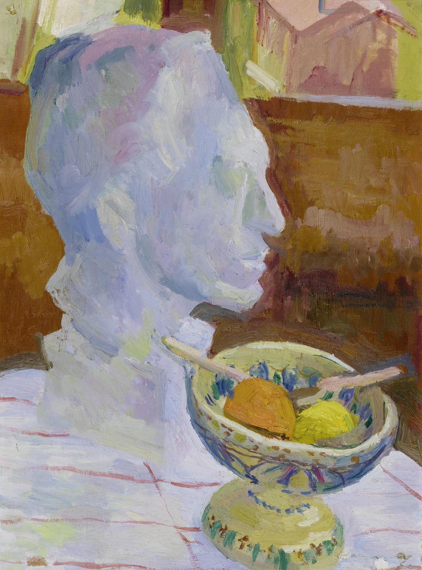 Stilleben mit Plastik (Bildnis Alberto Giacometti). 1929. Öl auf Leinwand. Rückseitig bezeichnet: Giov. Giacometti 1929. 50 x 37 cm.